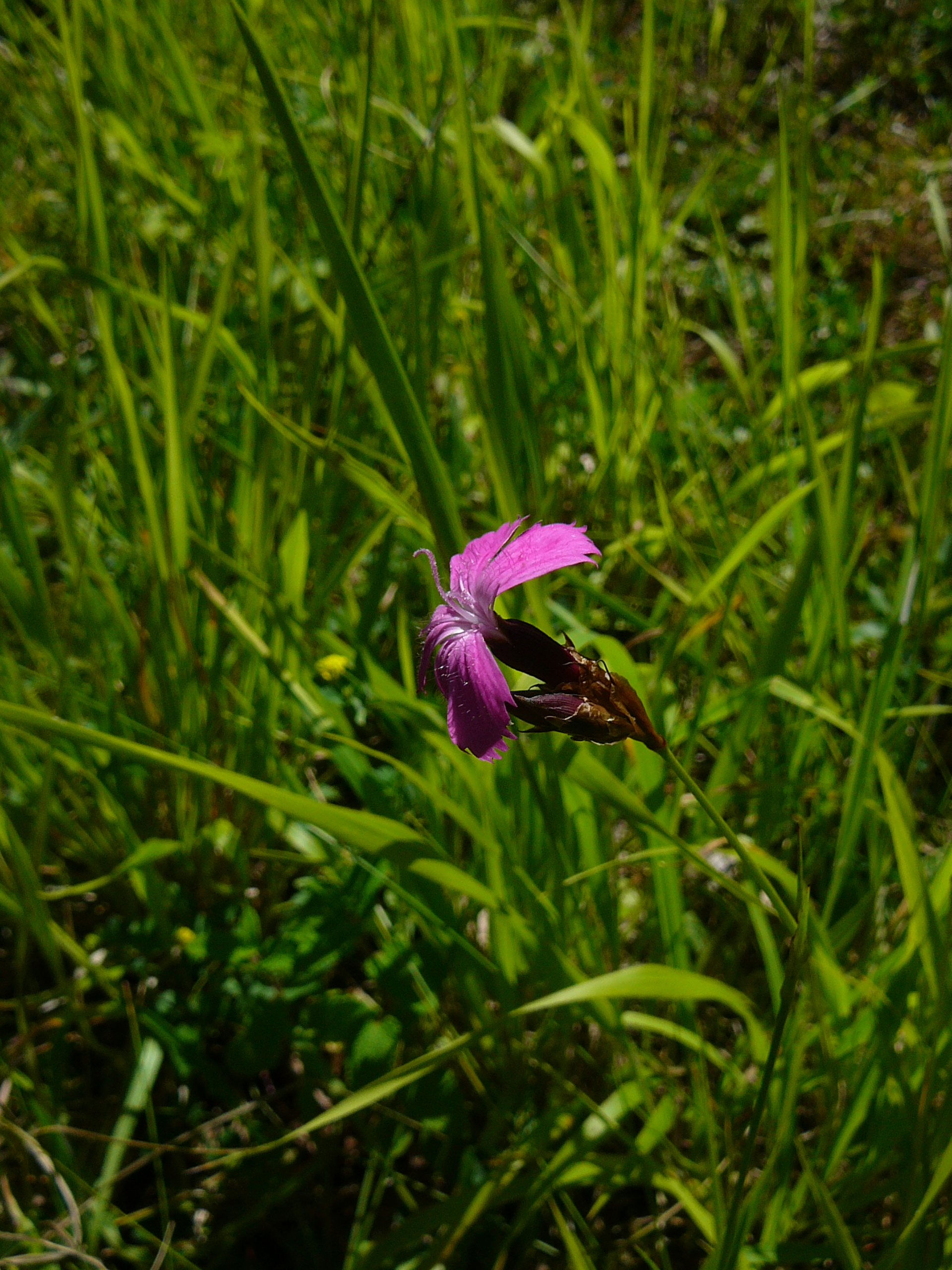 Grube 10, Haan-Gruiten